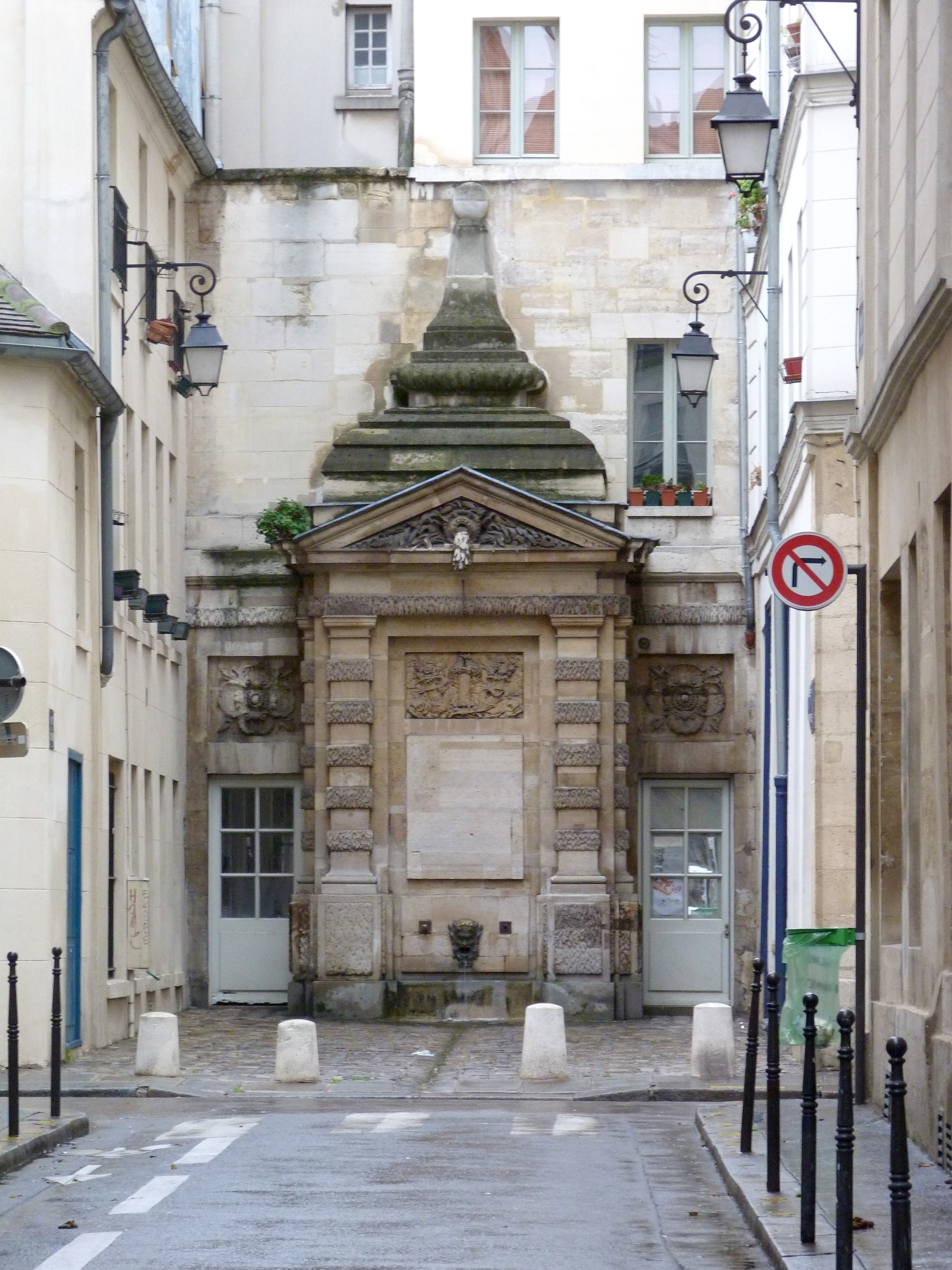 Fontaine de Jarente (1783), impasse de la Poissonnerie, Paris (4e arrondissement) - Vue de la rue Necker.